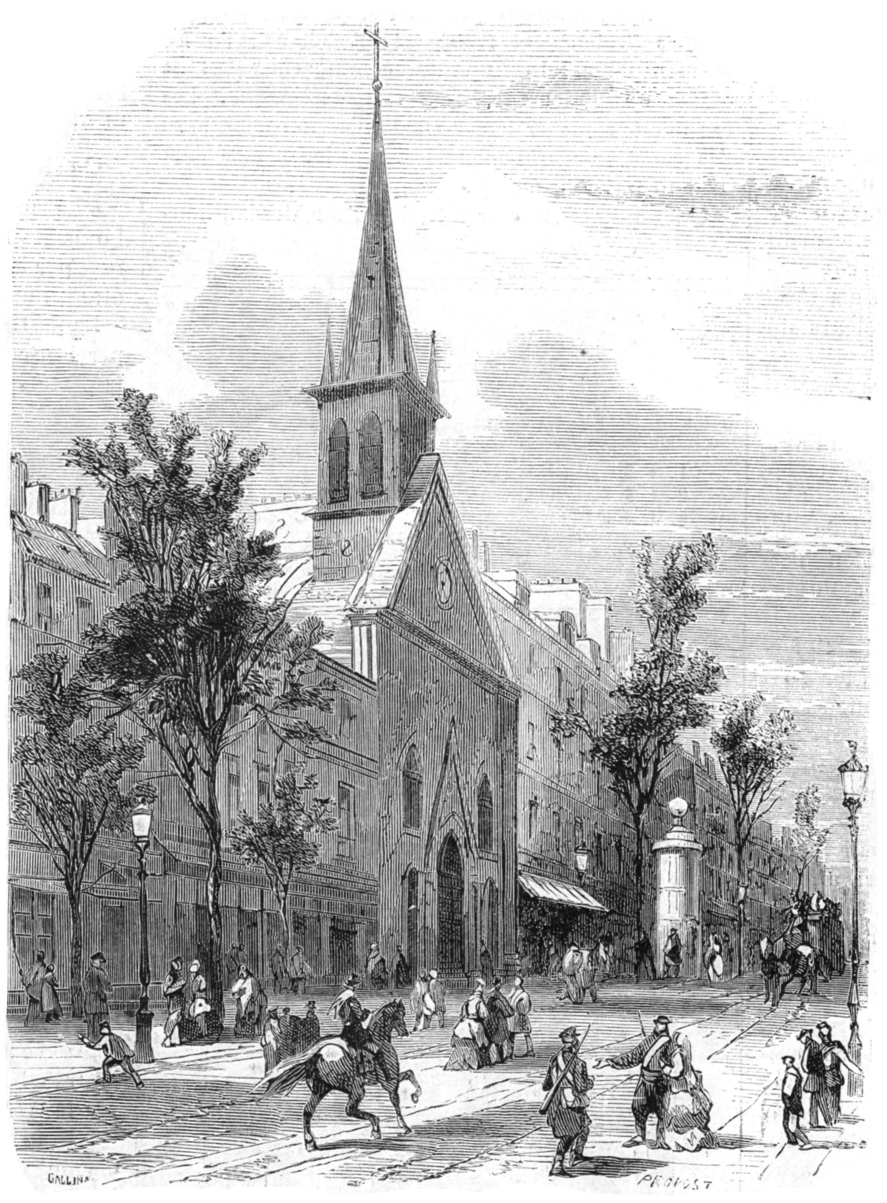 "Paris. - La chapelle Bréa, avenue d'Italie. - (D'après nature, par M. Provost)".